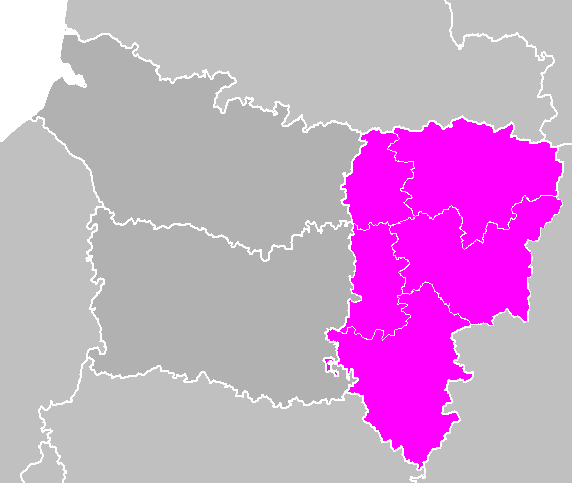 Carte des circonscriptions de l'Aisne